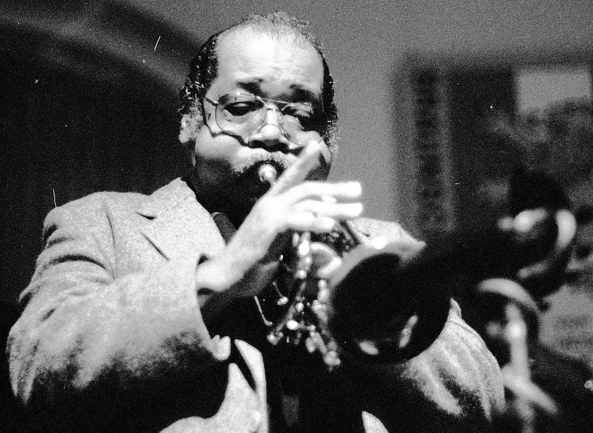 Nat Adderley mit seinem Quintett, 25.02.1993, Braunschweig